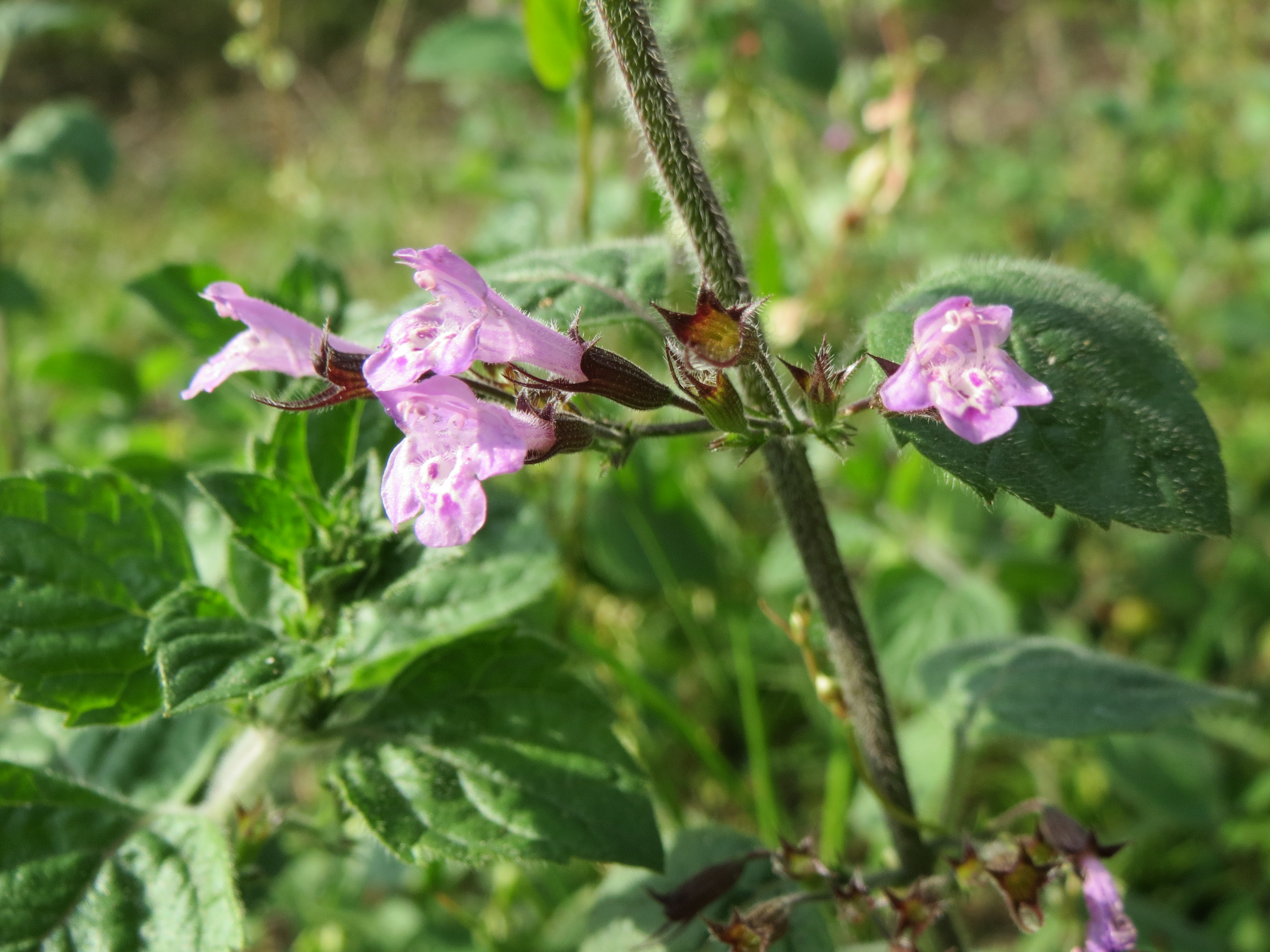 Wald-Bergminze (Calamintha menthifolia) im Schwetzinger Hardt